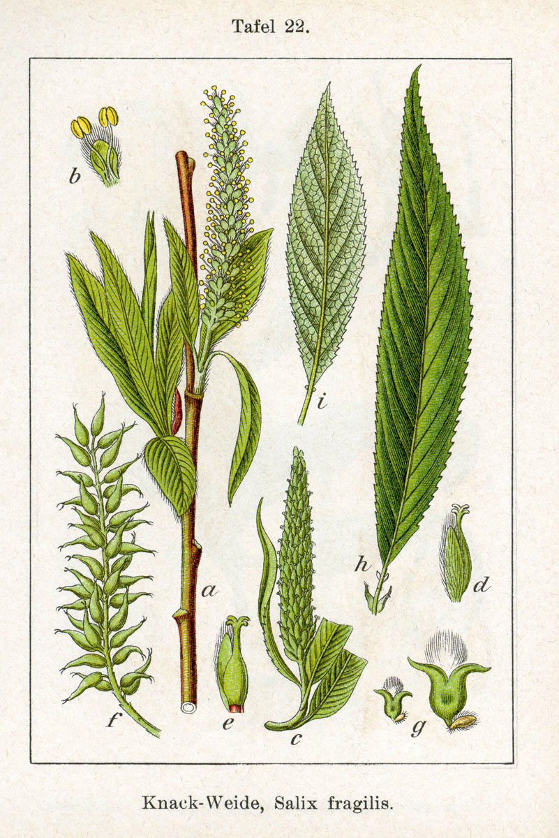 Salix fragilis L. Original Description Knack-Weide, Salix fragilis